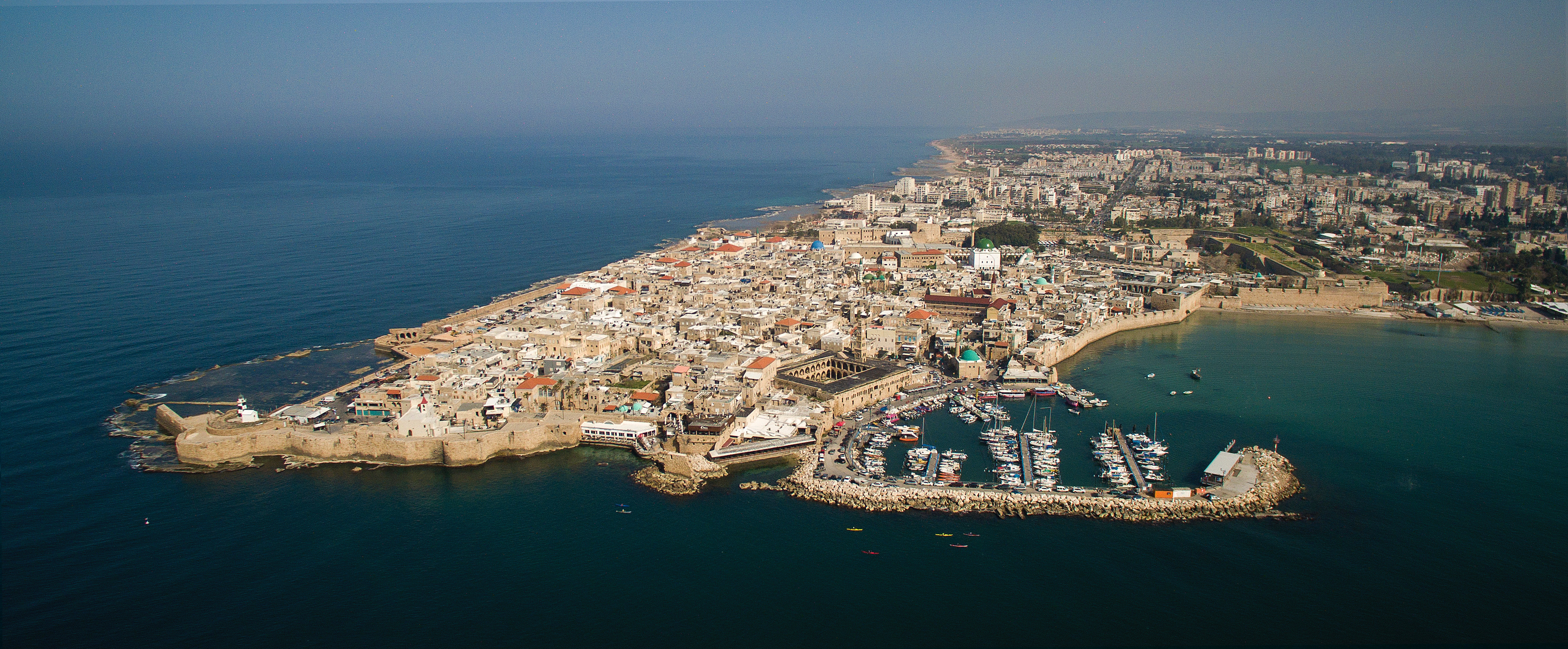 עכו העתיקה מלמעלה